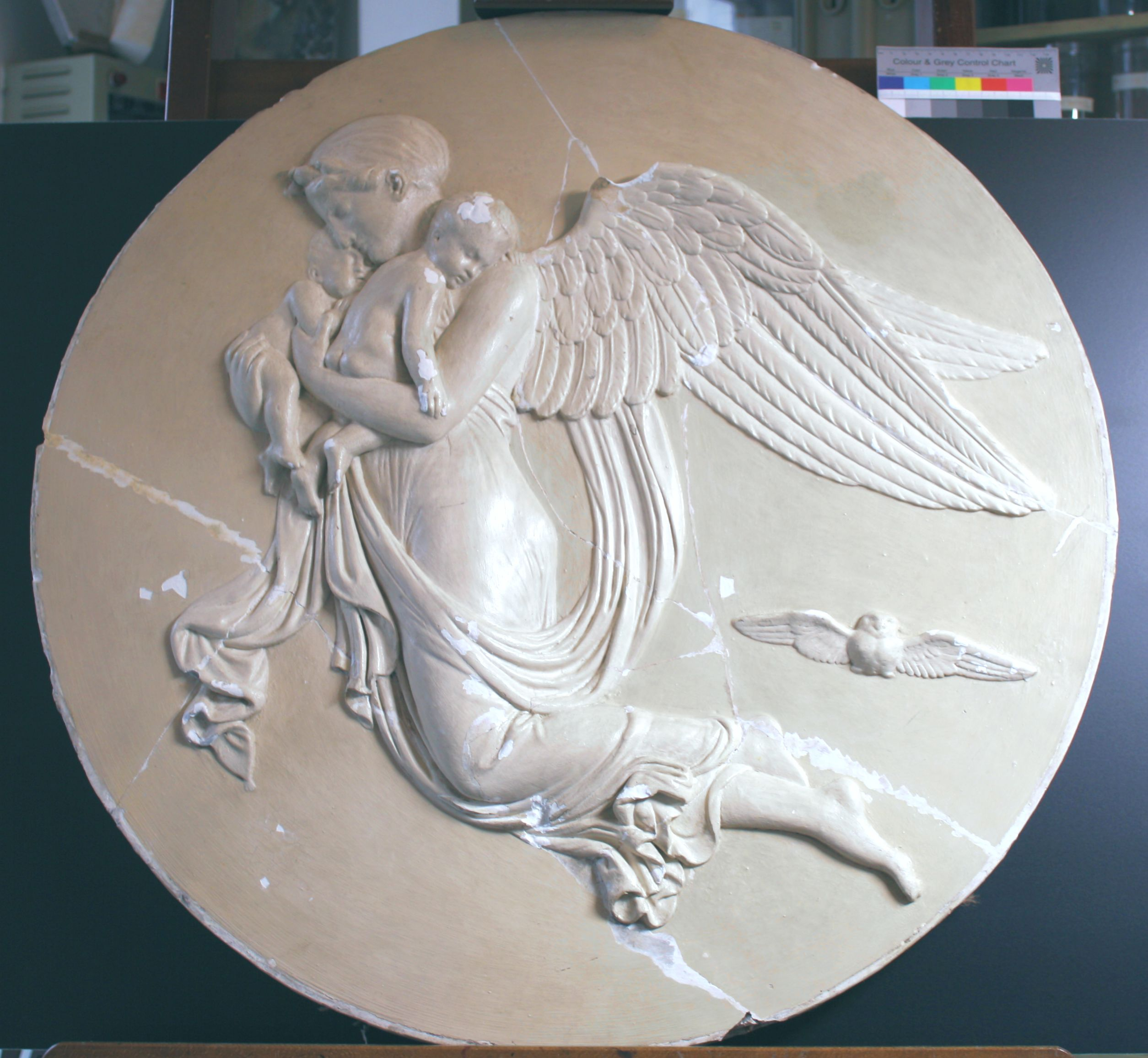 Tondo „Der Abend“. Das runde Stuckrelief zeigt eine schwebende, weibliche Figur mit Flügeln, die zwei kleine, schlafende Kinder trägt, die mit ihren Köpfen auf den Schultern der weiblichen Figur ruhen; nahe der Füße der Frau schwebt eine Taube. Gips mit Ölfarbfassung. Zustand während der Konservierung im Streiflicht. Die Oberfläche ist gefestigt und gereinigt, Überkittungen alter Verklebungen sind reduziert.